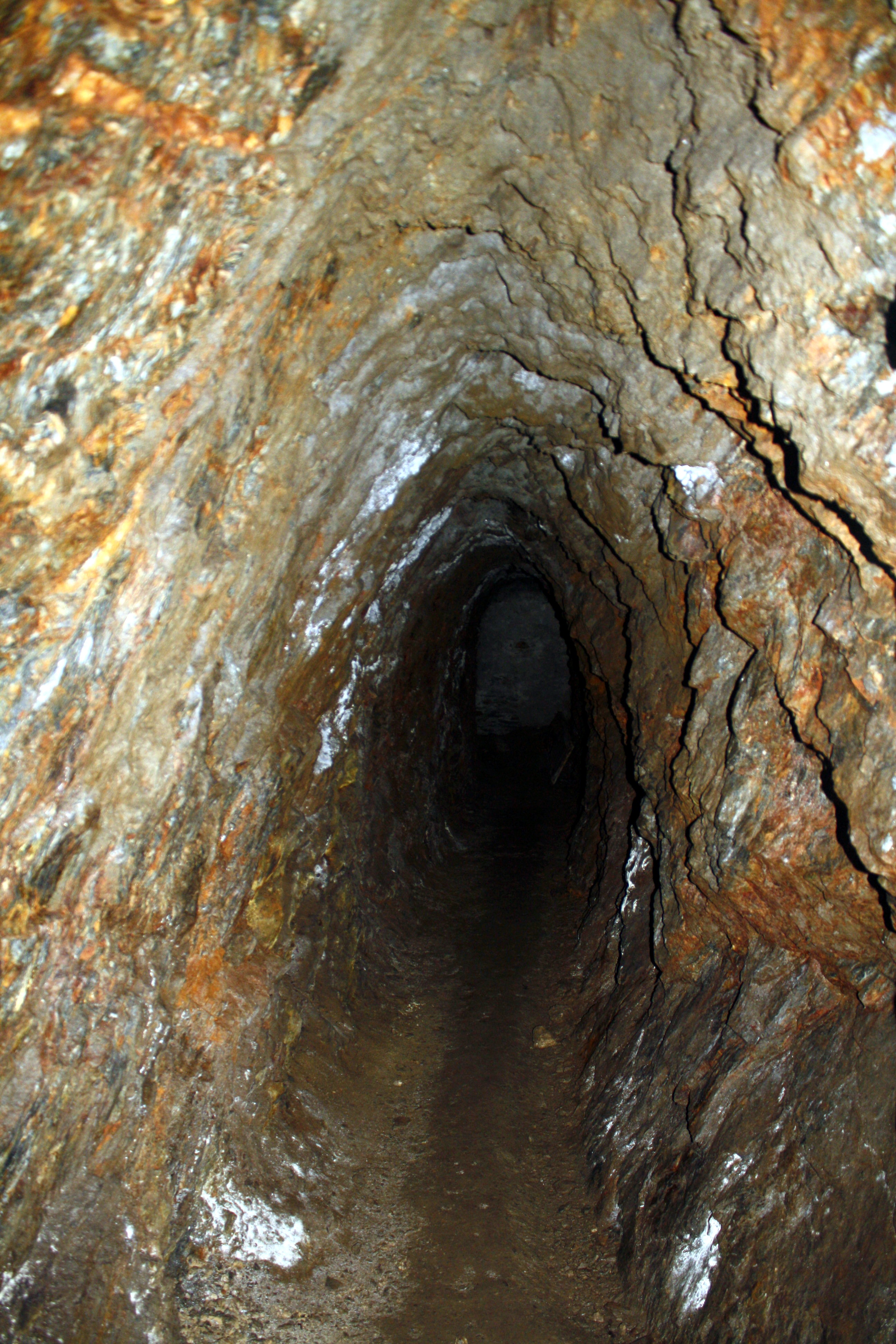 Une galerie creusée dans la roche du magasin sous roc du fort du Mont.